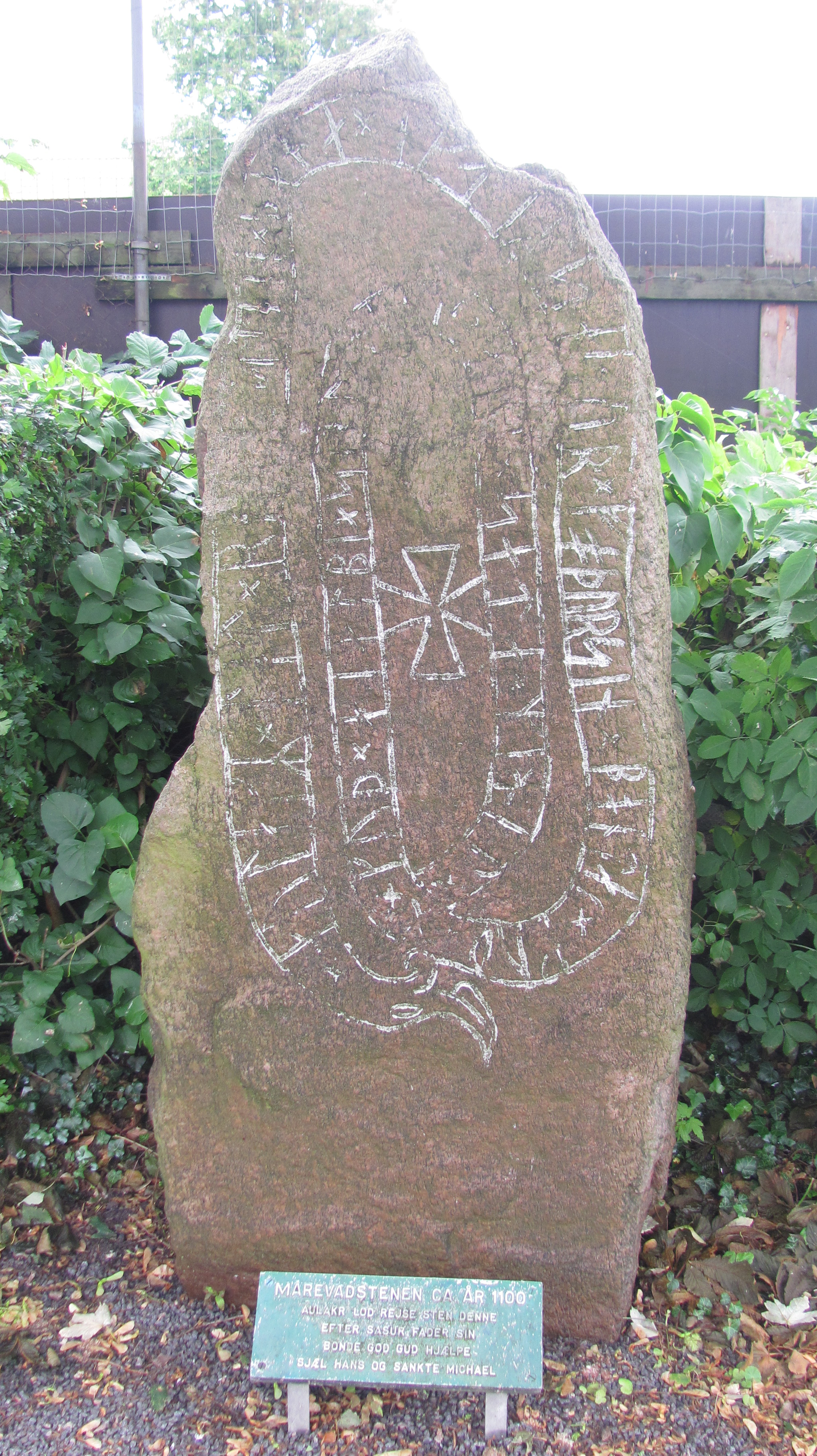 Marevadstenen fra wikingertiden i Hasle, Bornholm, Danmark